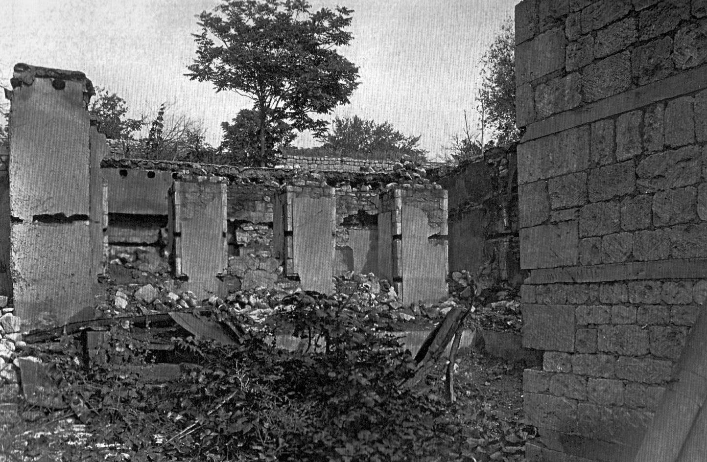 Şıxminas bölgəsində Cəfər-Qulu Axundovun evinin dağıntıları